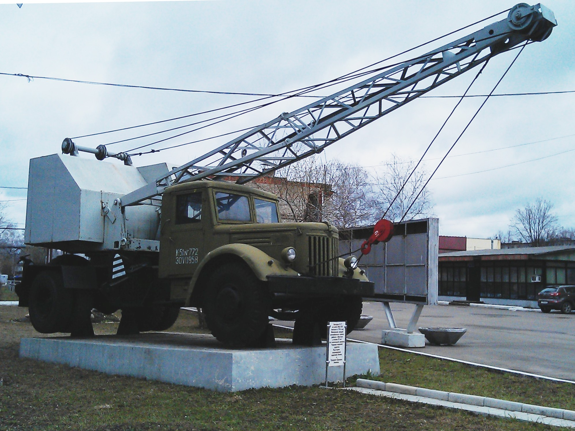 Первый кран выпущеный заводом Автокран